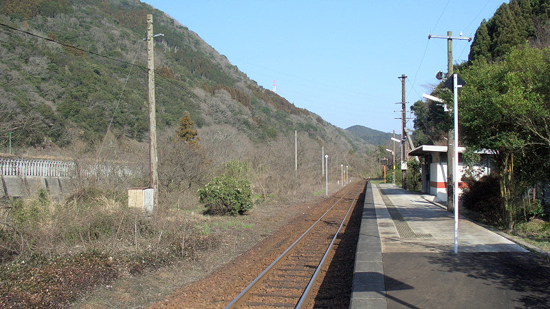 JR肥薩線那良口駅 ホーム 写真奥が人吉駅方面 撮影者/著者/著作権保有者 : MK Products (本人がアップロード) 撮影日 : 2007/02/24 那良口駅用にアップロードした画像です。良い画像があれば別の画像に変えてください。